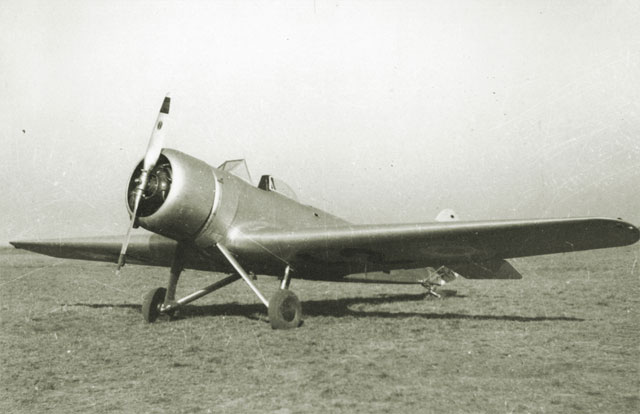 FMA Ae. M.Oe. 1